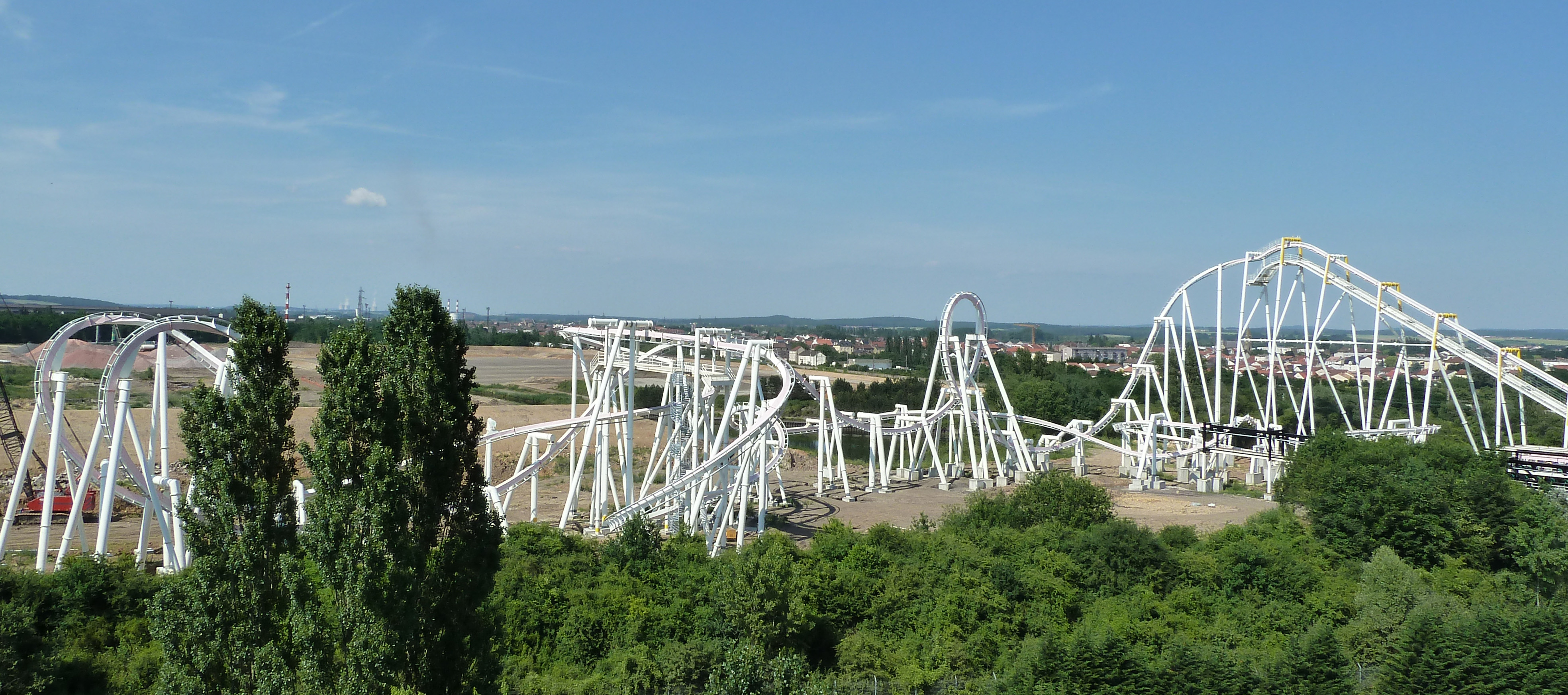 second panorama de dad57c